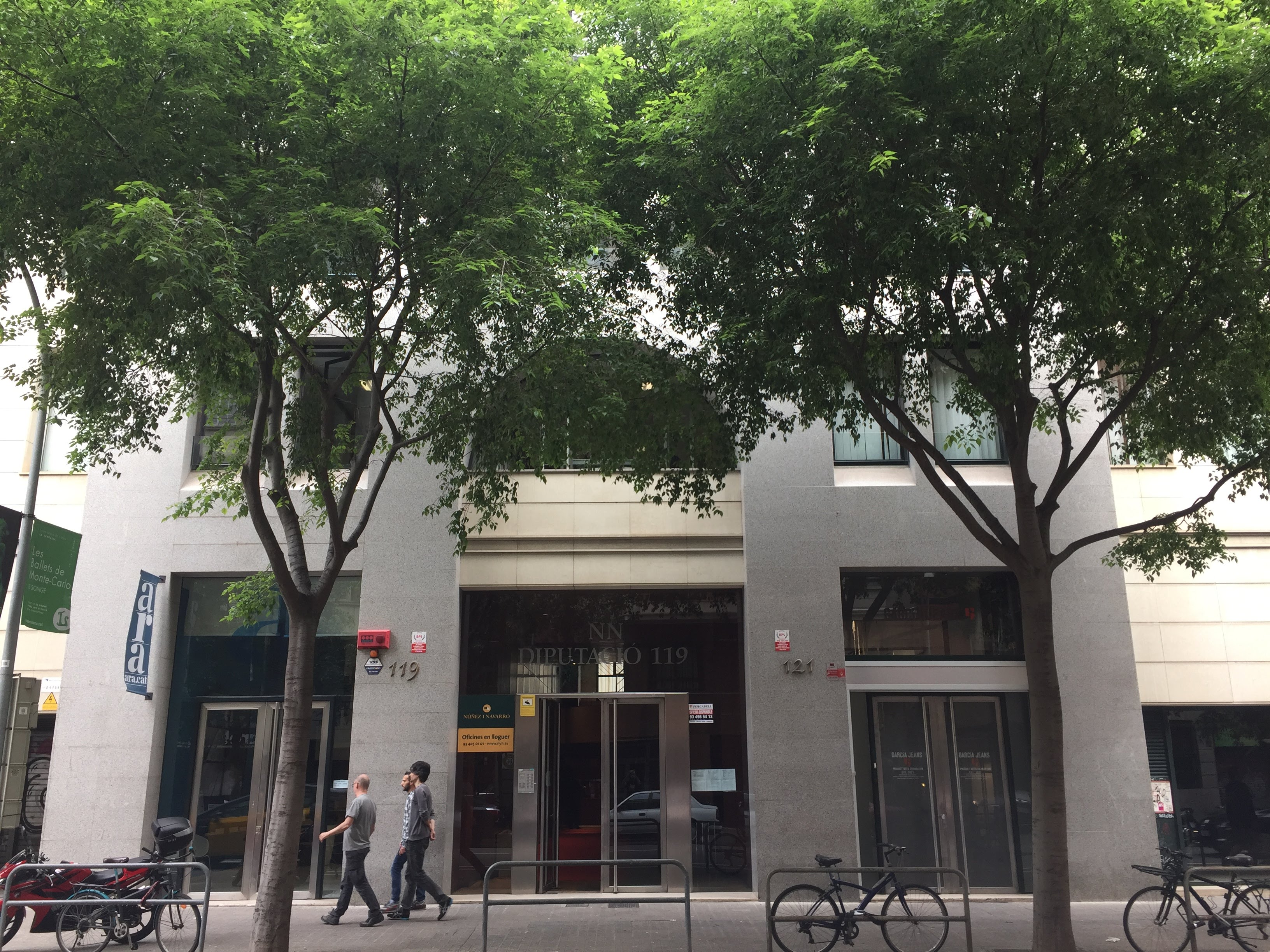 Diari Ara 2018